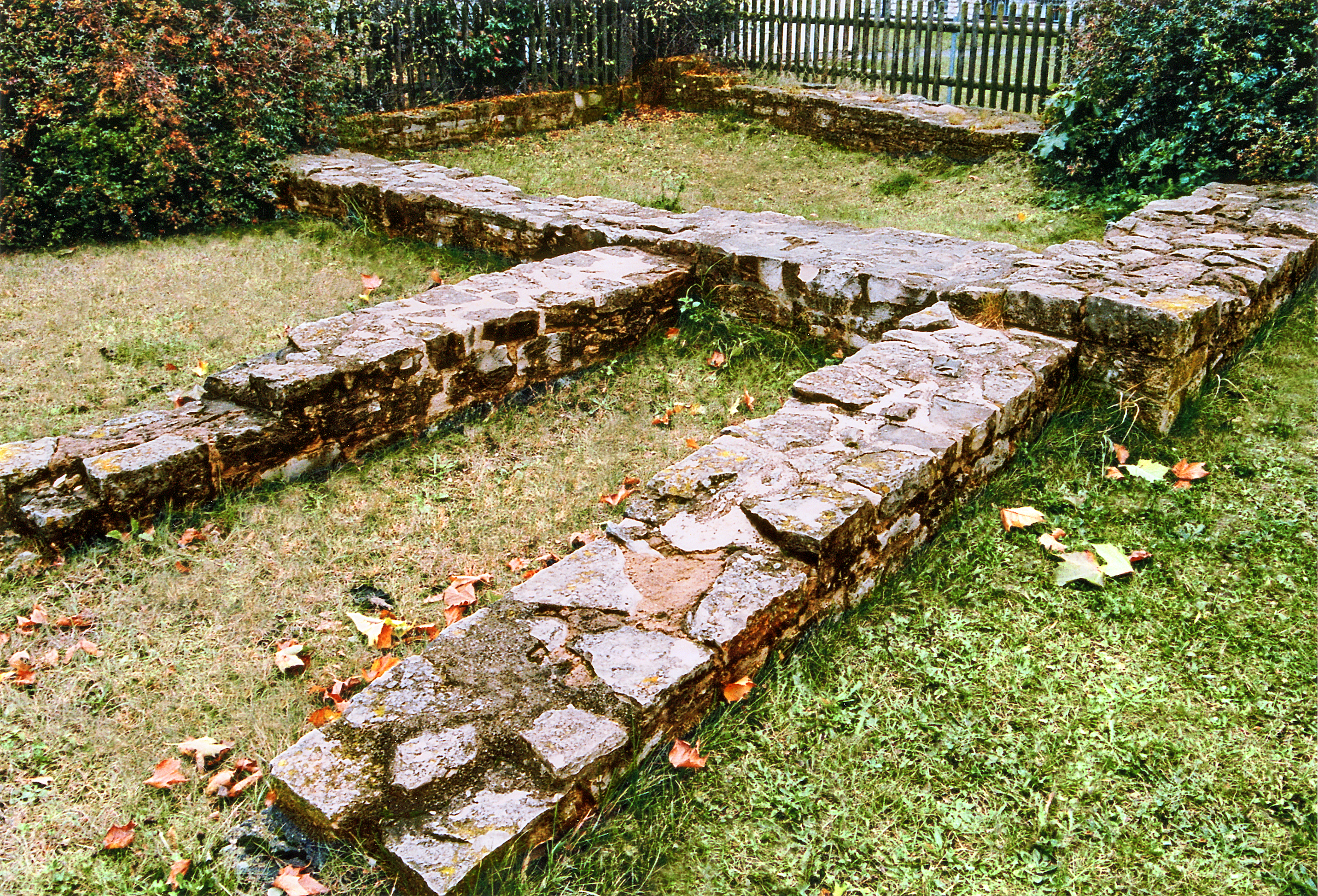 Gemauerter, zugeschütter Kellerbereich eines hölzernen Streifenhauses im Vicus Weißenburg. Nach der Grabung teilrekonstruiert und an einem Parkplatz nahe der großen Thermen gelegen für die Nachwelt erhalten. Zustand am 11. Oktober 2009.